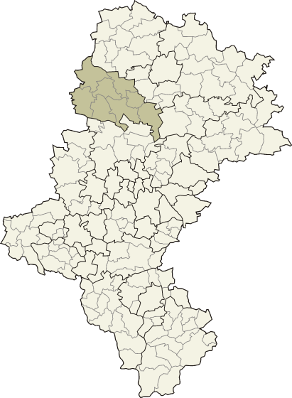 Powiat lubliniecki w województwie śląskim